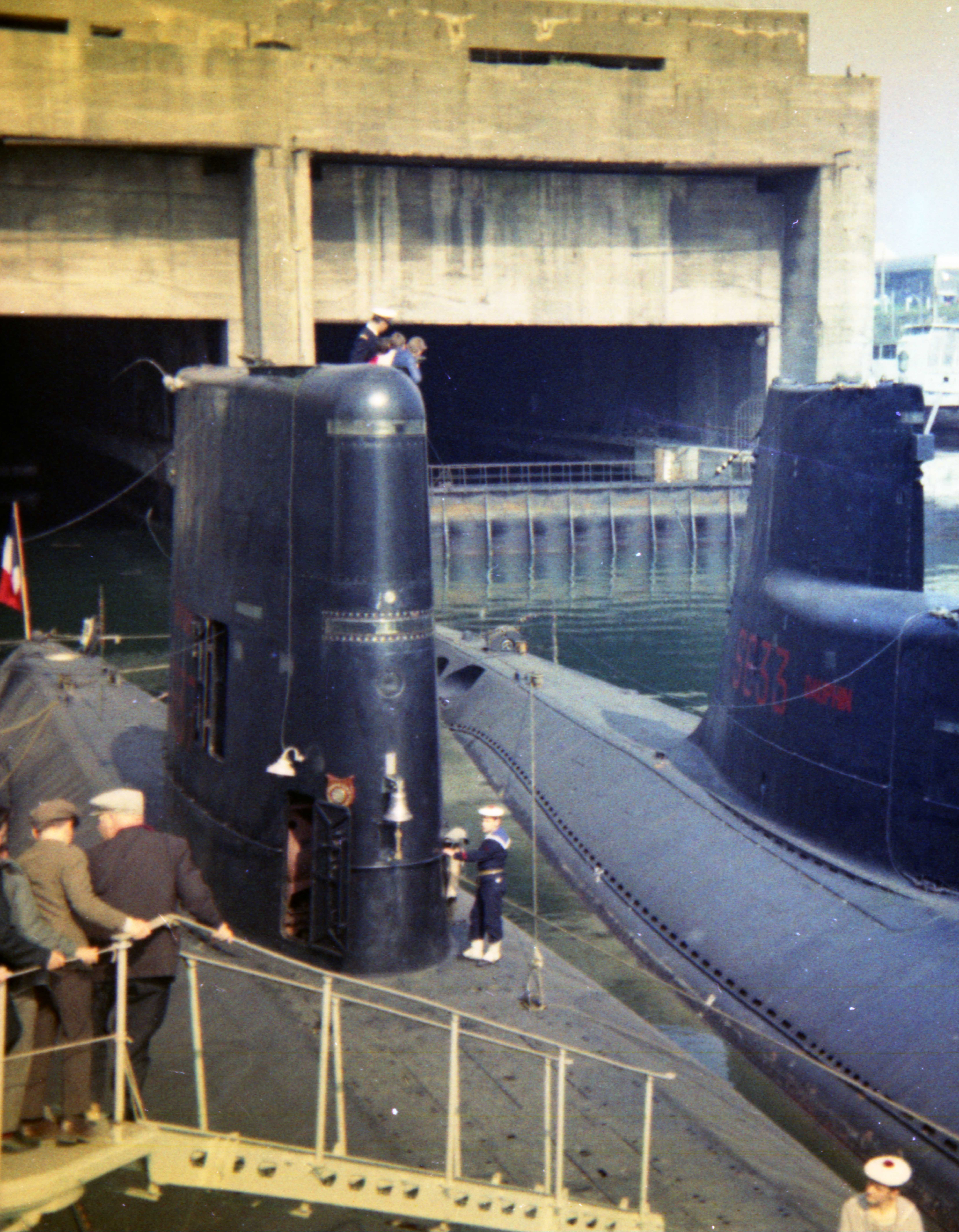 Escale de deux sous-marins d'escadre l' "Espadon" et le "Dauphin avec leur navire de soutien logistique le "Rhone" dans le port de La Pallice. L' "Espadon construit en 1955 et désarmé en 1985 est maintenant exposé à l'écomusée de Saint-Nazaire depuis 1987. En revanche, le "Dauphin" construit en 1953 et désarmé en 1992 a servi comme cible au large de Toulon. Le "Rhône" construit en 1962 a été désarmé en 1997. Visite des sous-marins par le public. Photographie prise en juillet 1969 au port de commerce de La Rochelle-Pallice.